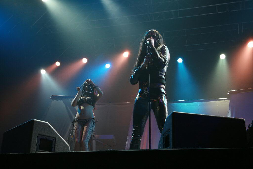 Fotos del concierto de Nancys Rubias en el FIZ07, Festival de Música Independiente de Zaragoza (6 de octubre de 2007). Aquí tenéis una Crónica del Festival de Música Independiente de Zaragoza FIZ 2007